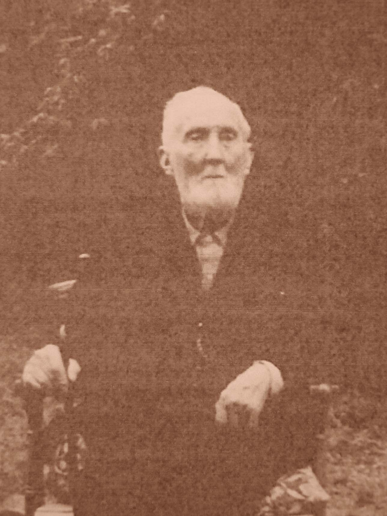 Der Maler Georg Gustav Estler (1860-1954) im Garten in Klotzsche bei Dresden